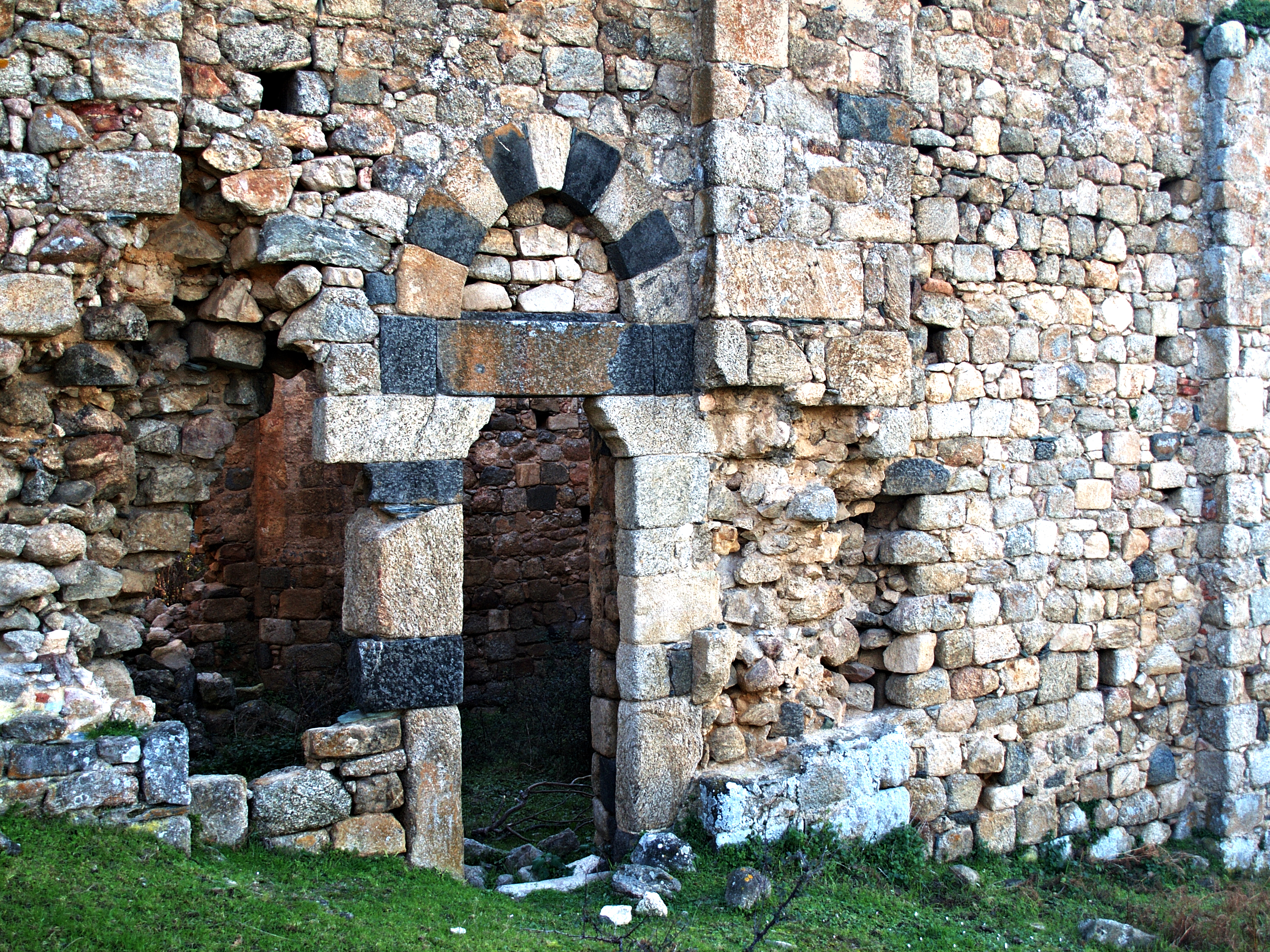 Ville-di-Paraso, Balagne (Haute-Corse) - Ruines de l'ancienne Pieve San Ghjuvanni à Tuani. Porte latérale droite